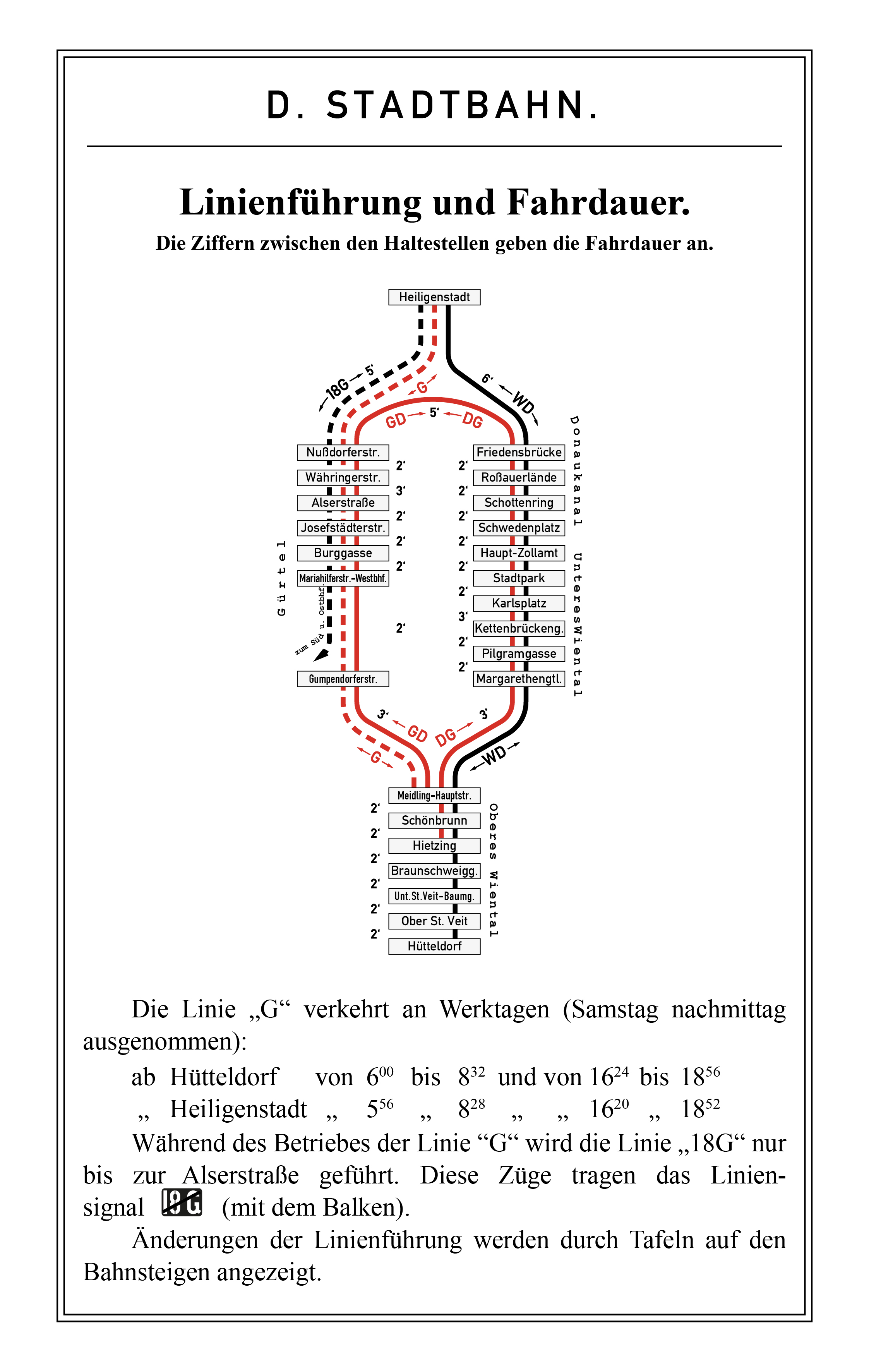 Historia retmapo de la urbfervojo de Vieno